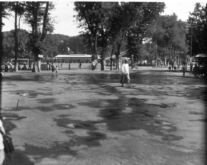 Foto. De aloen-aloen te Sitoebondo op Oost-Java